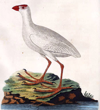 Gemälde mit einem Lord-How-Purpurhuhn (Porphyrio albus)